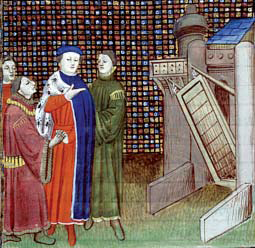 « Le duc de Bretagne Jean IV et ses conseillers », dans les Chroniques de Jean Froissart. B. M. Besançon, MS 865, f. 408 v° (détail). Cl. IRHT-CNRS / Enluminures